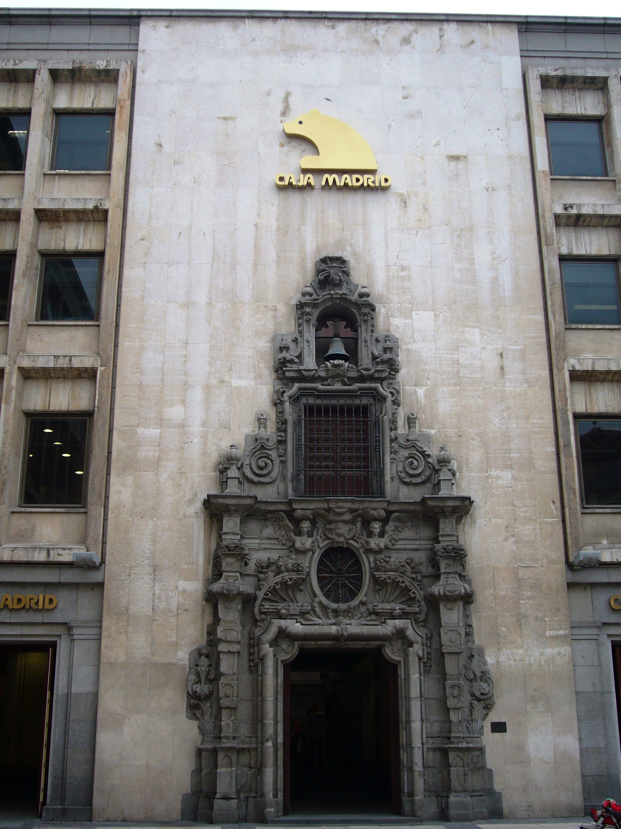 Madrid, plaza de las Descalzas: Monte de Piedad & Caja Madrid